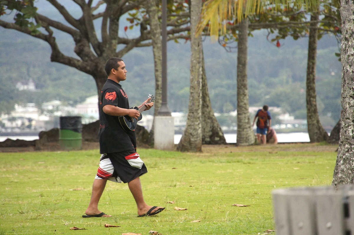 Иллюстрация Второва И.П. для учебника Гавайеведение.